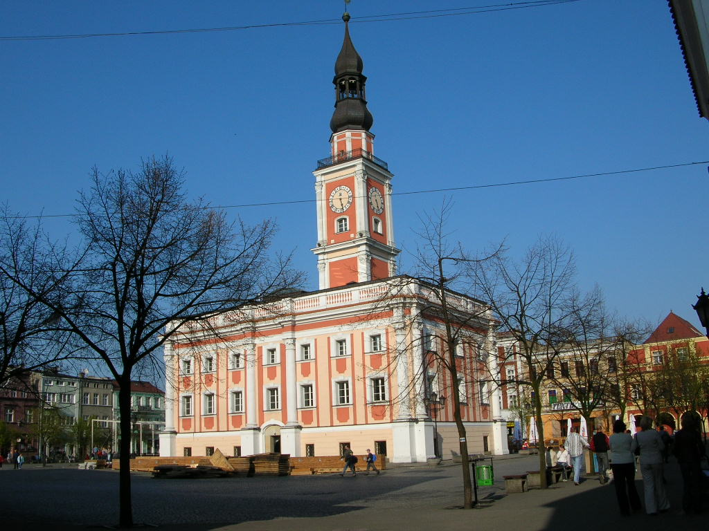 Leszno - Ratusz.